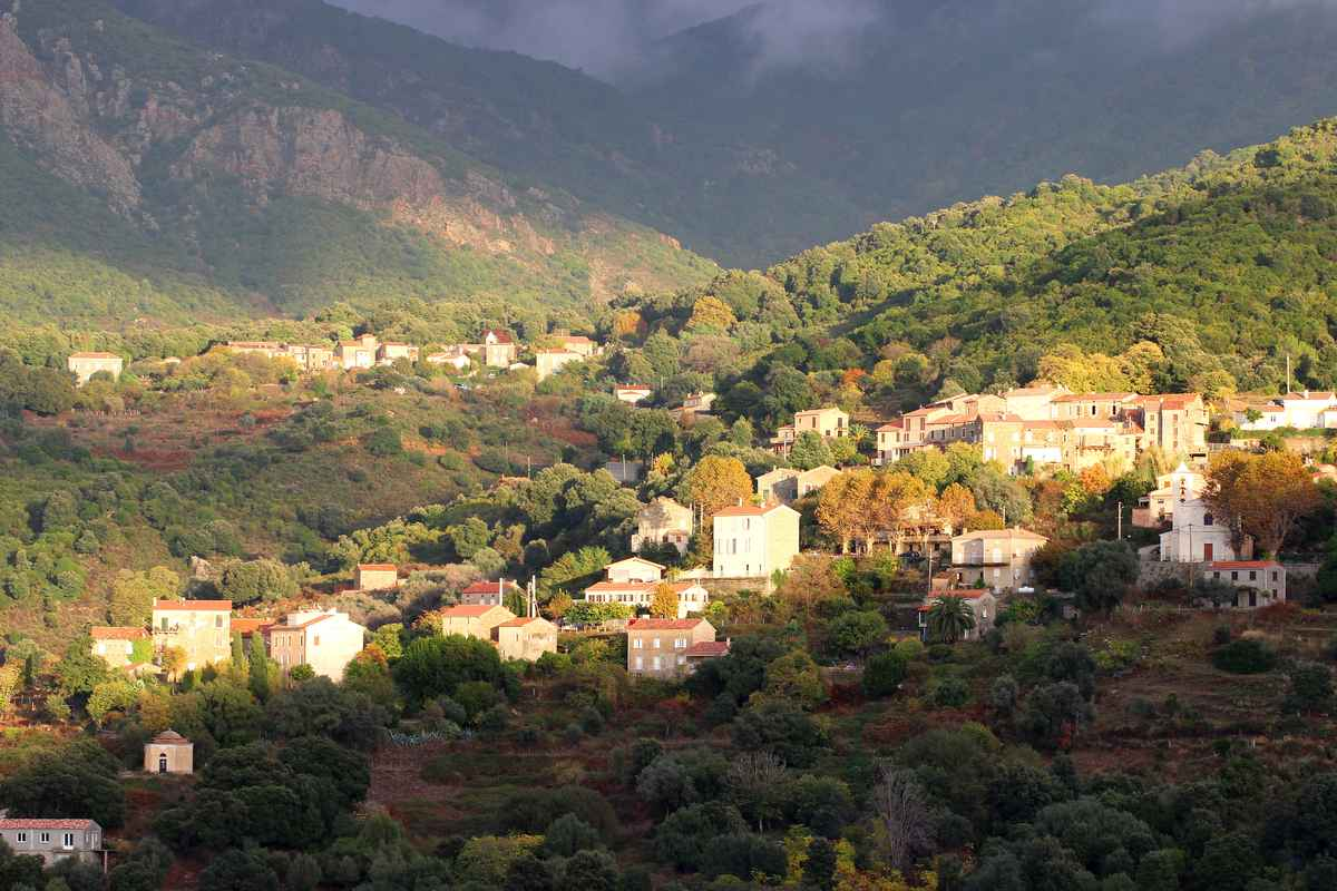 Vue générale du village de Sant'Andréa d'Orcino.